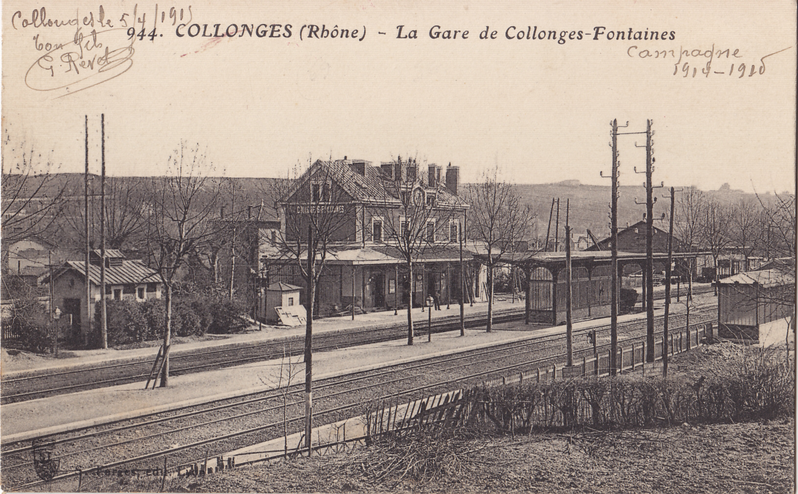 Carte postale ancienne éditée par Farges à Lyon : COLONGES - La gare de Collonges-Fontaine